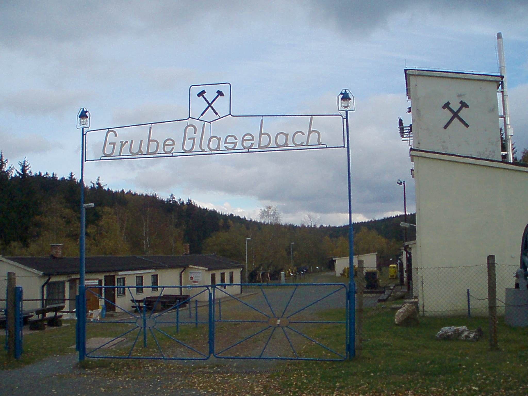 Grube Glasebach